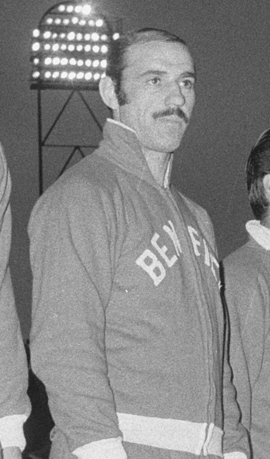 Germano de Figueiredo en 1962